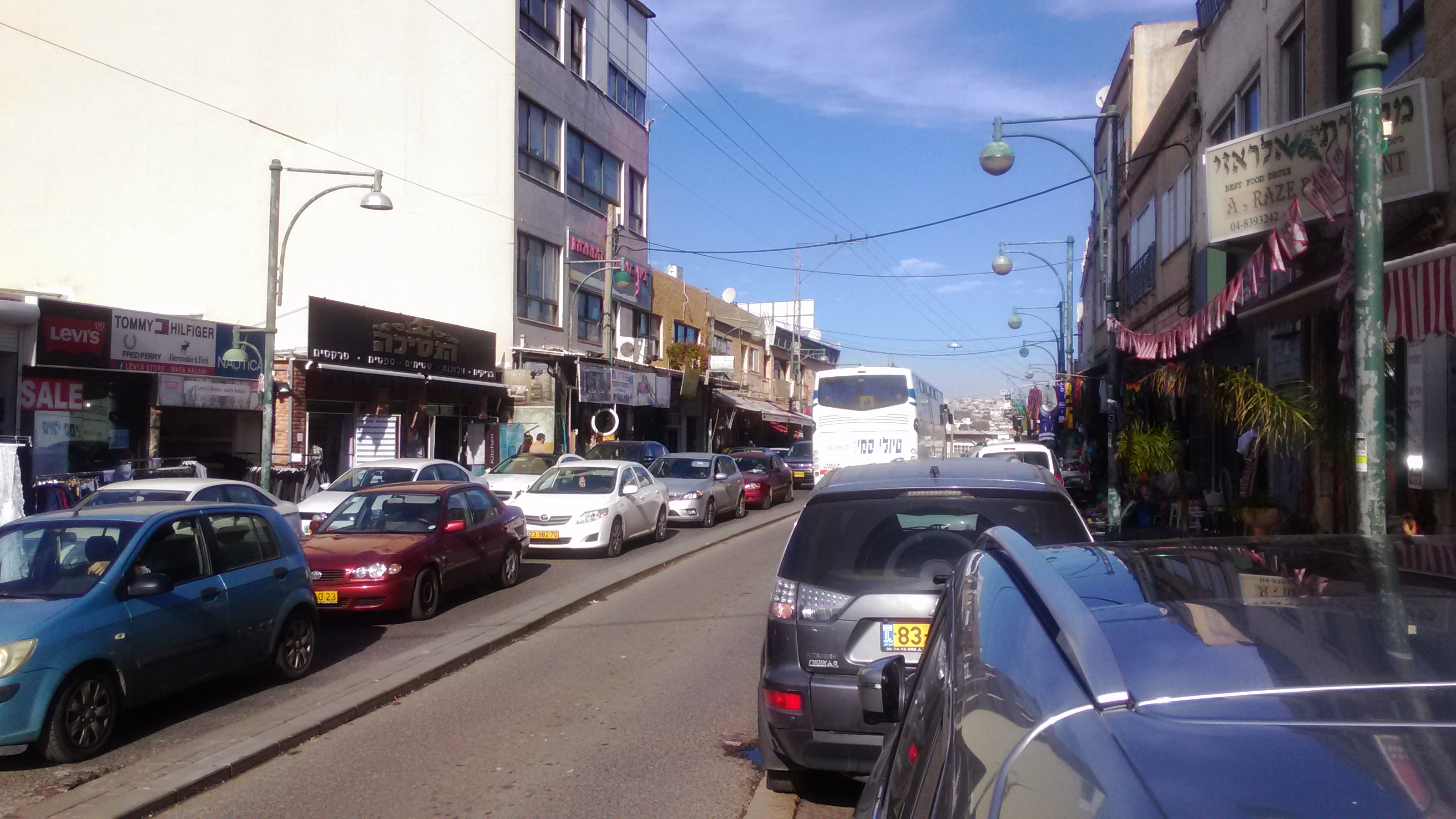 דלית אל כרמל, הרחוב הראשי